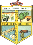 Escudo de Valle de Zaragoza. Adopta la forma rectangular. En su cabeza se dibuja una corona, que representa la autorización real para la constitución del mayorazgo por el cual tuvo su origen y debajo de ella, el nombre de su propietario: Valerio Cortés del Rey. El escudo se divide en cuatro cuarteles con una franja en la que se inscribe en forma horizontal el nombre del municipio, y en la vertical su lema: "TRABAJO Y HOSPITALIDAD". El cuartel superior izquierdo se reservó para la producción agrícola del municipio, con matas de maíz y trigo, mismas que se apoyan en instrumentos mecánicos. El superior derecho para la fruticultura, para lo cual se eligieron en su representación árboles de nogal. En el inferior izquierdo se dibujó una figura que representa la actividad ganadera y tiene como fondo el canalde Bella Vista. En el inferior derecho, una barca y una red simbolizan los productos pesqueros que se obtienen de la presa. El autor de este escudo es el Prof. Rafael Arroyo Fácil.